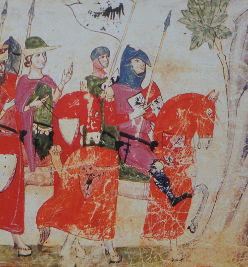 JIndřich Kastilský s Konradinem